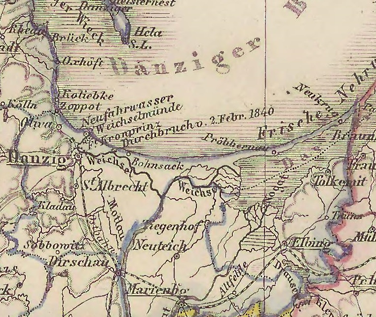 Landkreis Danzig in Westpreußen 1818 to 1878